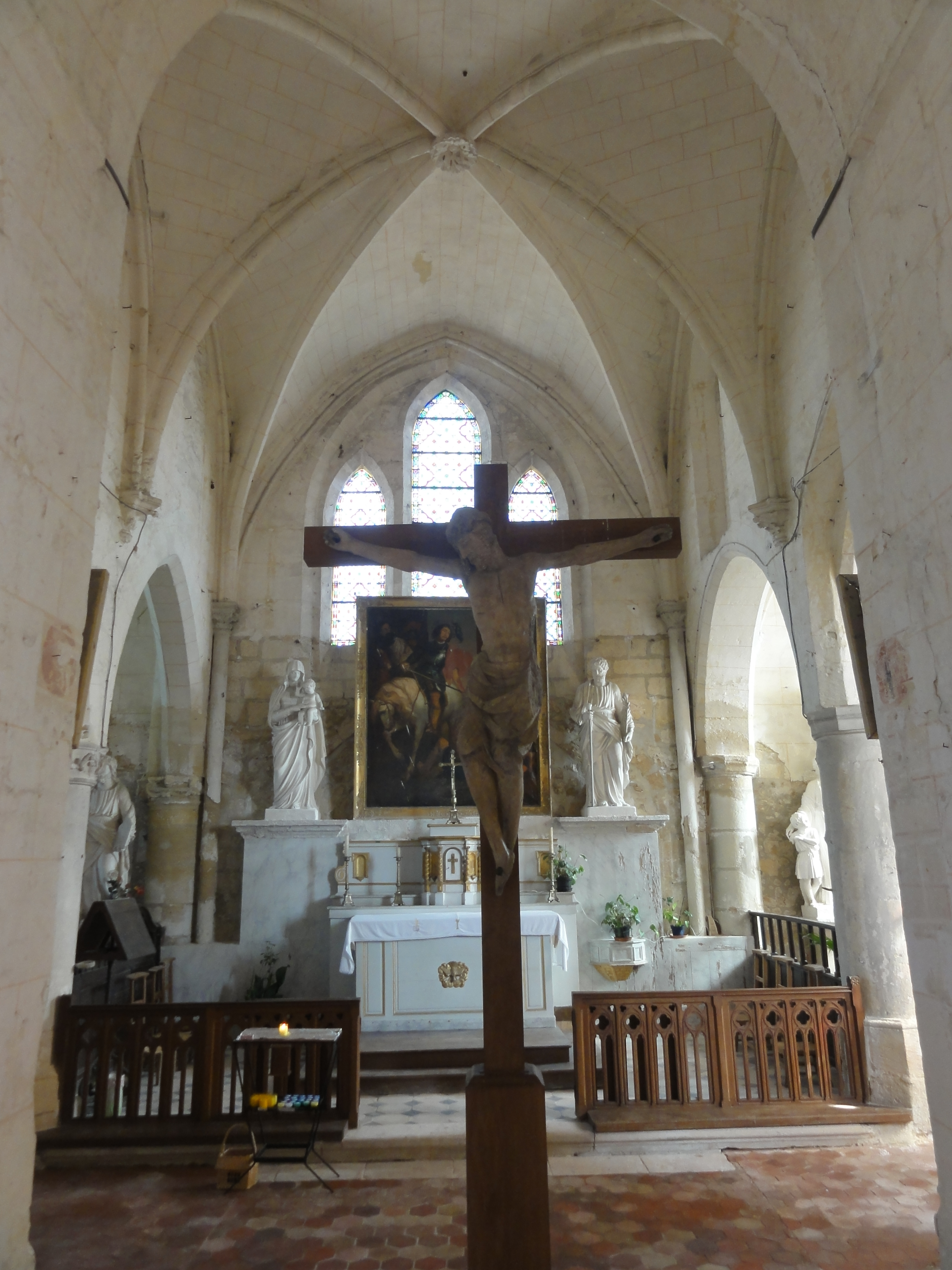 Intérieur de l'église - voir titre.